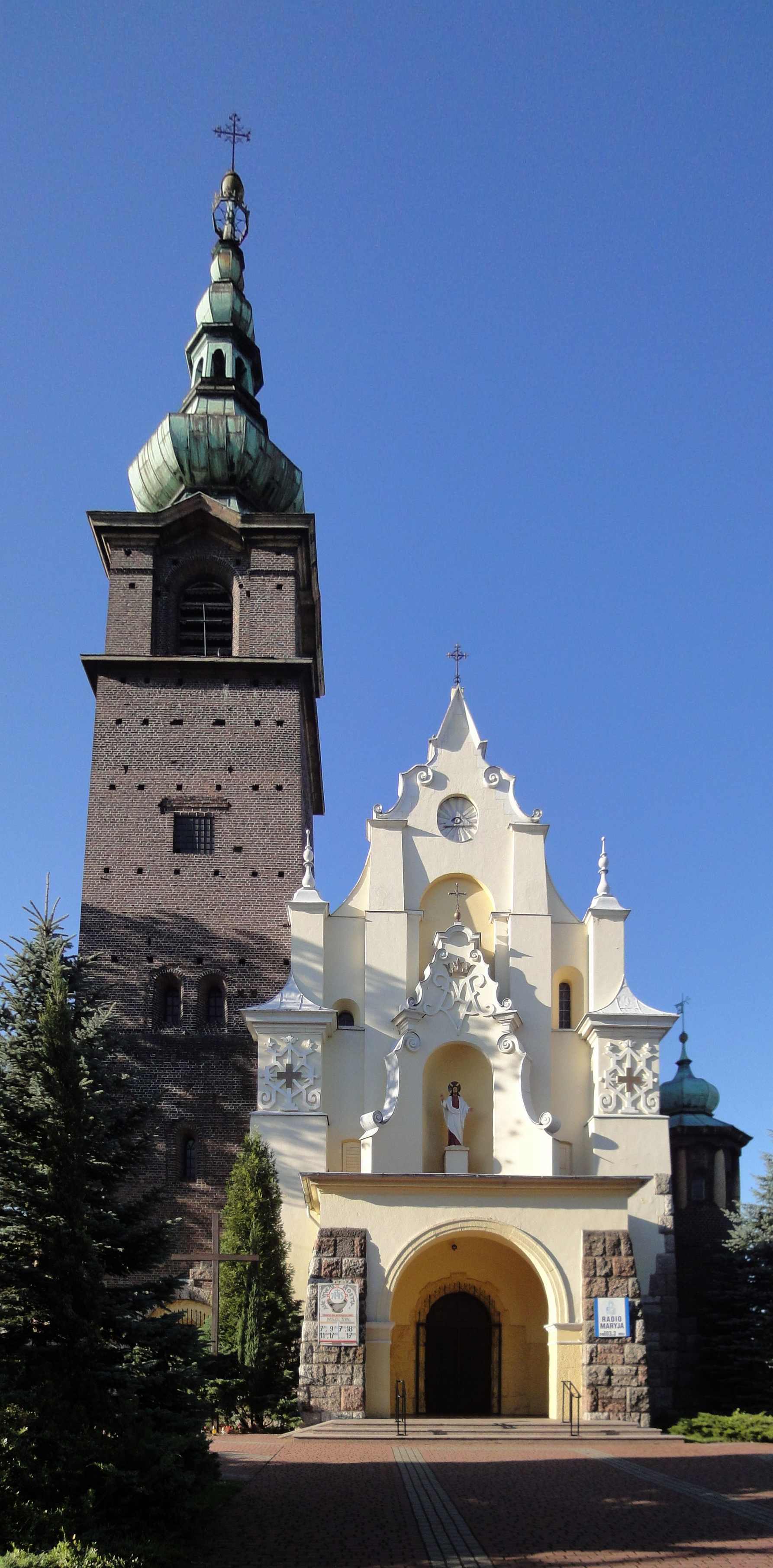 Kościół św.Antoniego w Wojkowicach (widok od strony ulicy Sobieskiego).